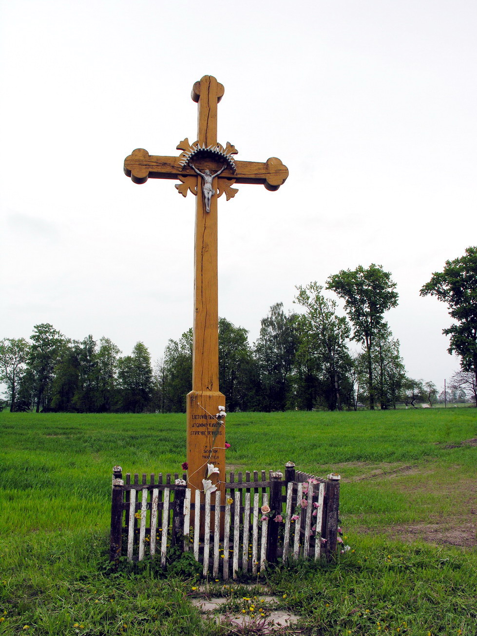 Šašiai 2009 m. gegužės 17 d.